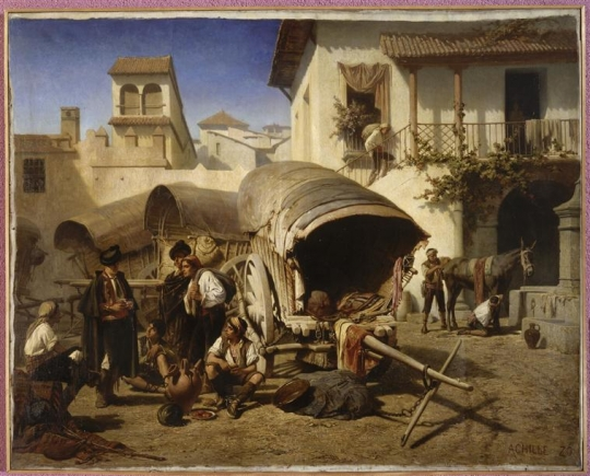 Kordobako San Rafael ostatua, 1861, Achille Zo.